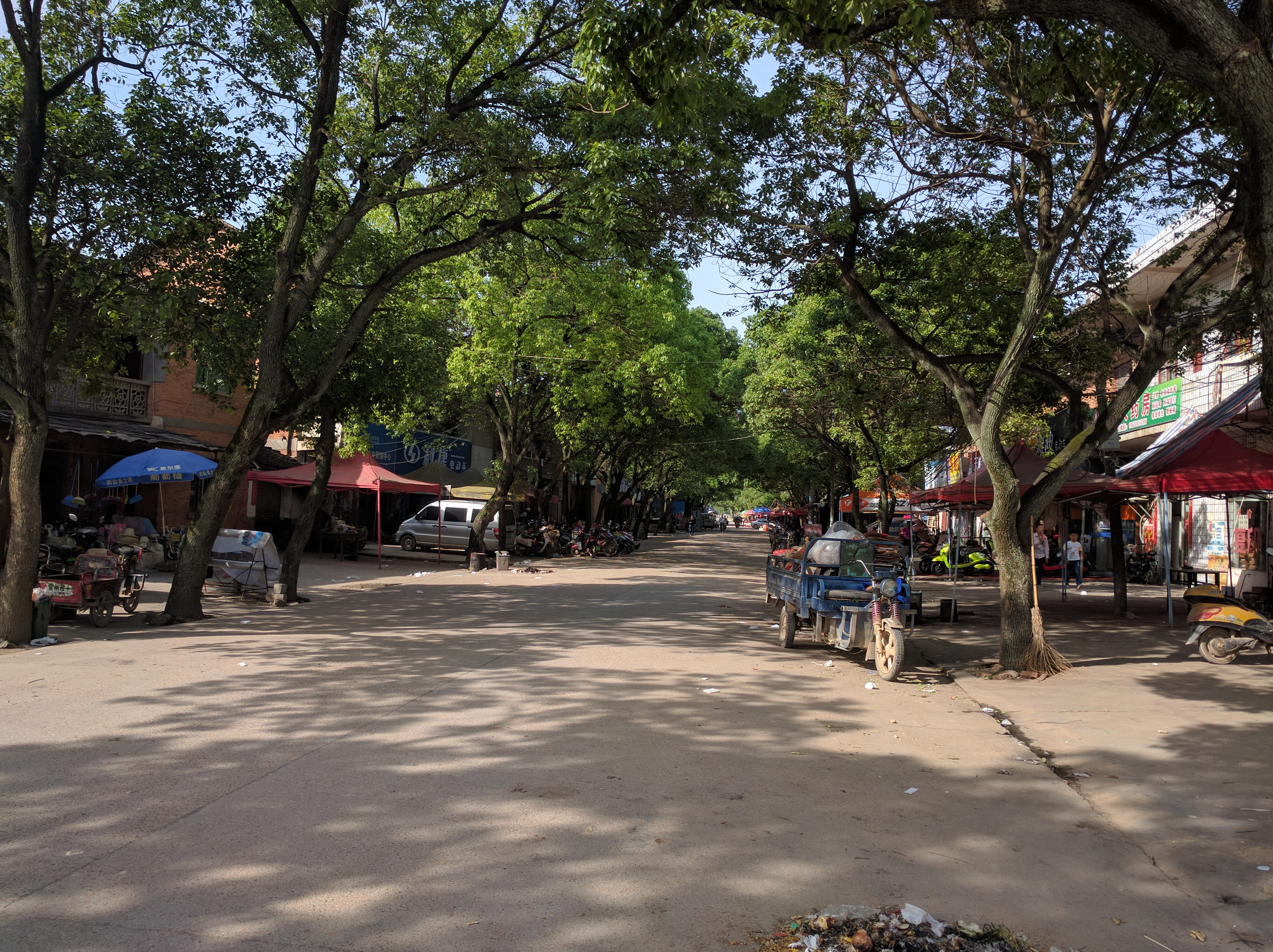 东新街附近